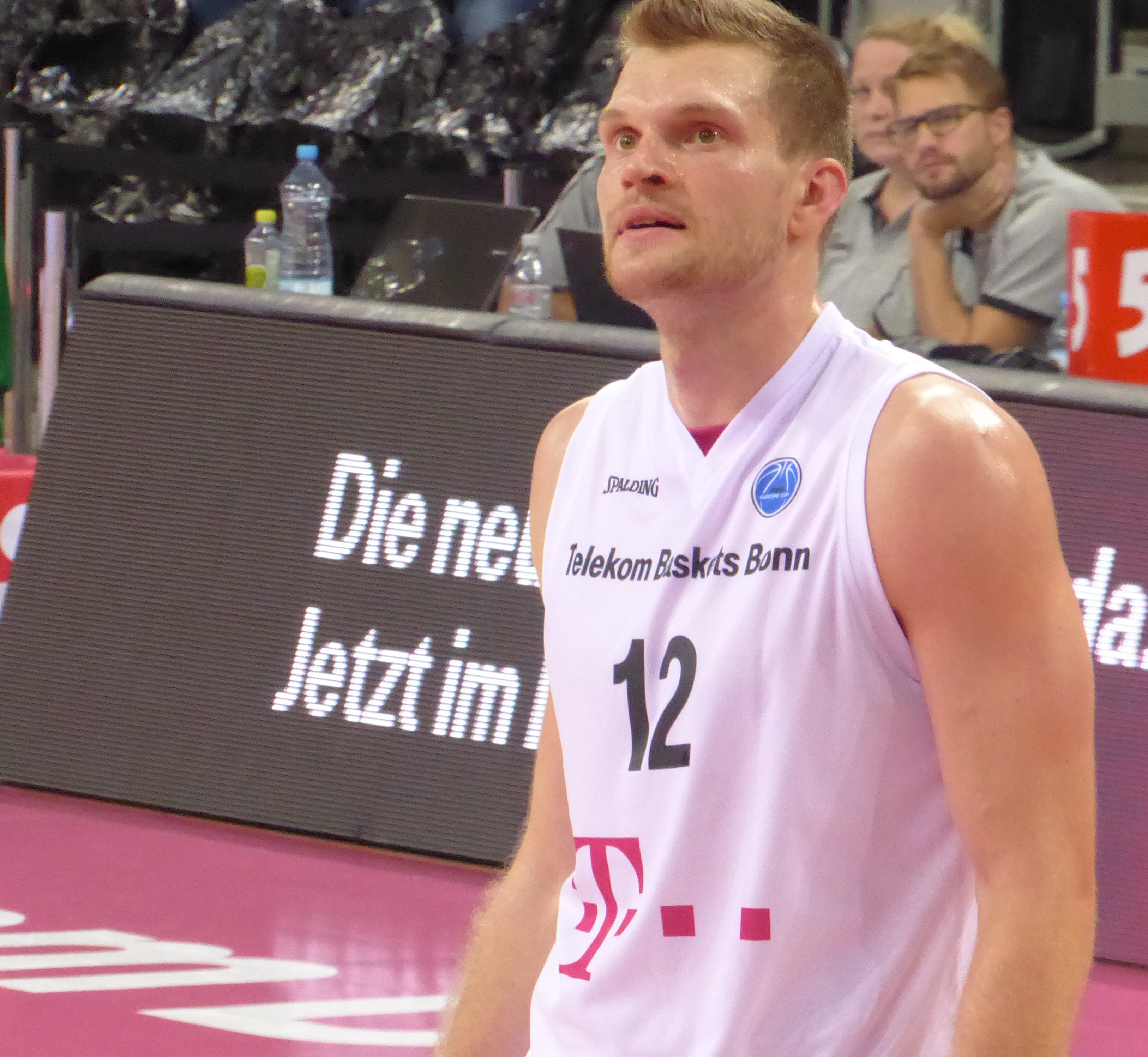 Florian Koch beim Spiel der Telekom Baskets Bonn gegen die Södertälje Kings am 25. Oktober 2016.